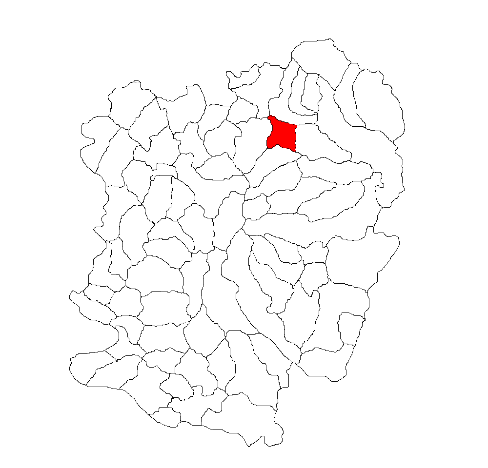 Categorie:Hărţi ale judeţului Caraş-Severin